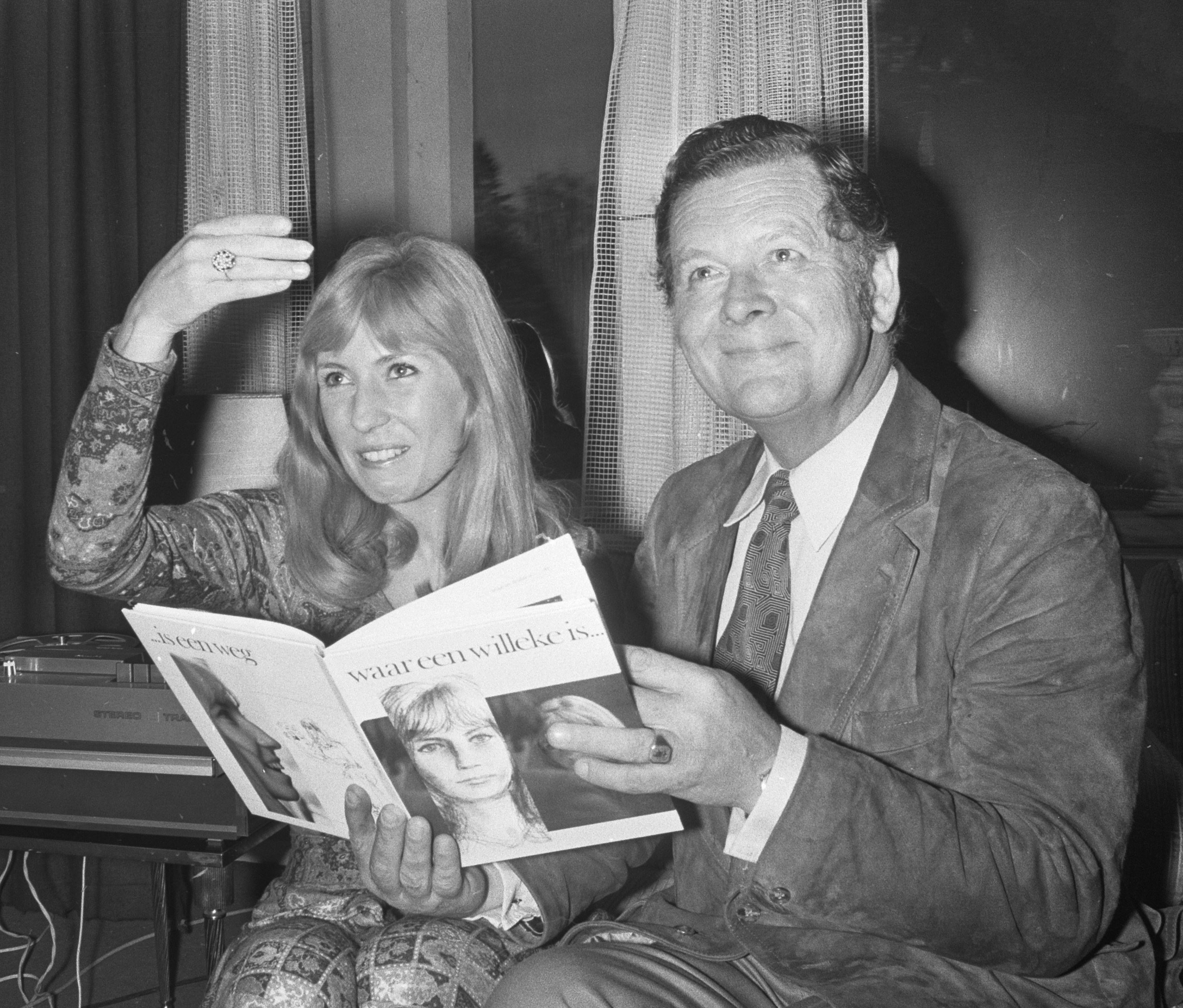 Willeke Alberti toont boek "Waar een Willeke is" , Blaricum, Willeke en Willy van Hemert met boek